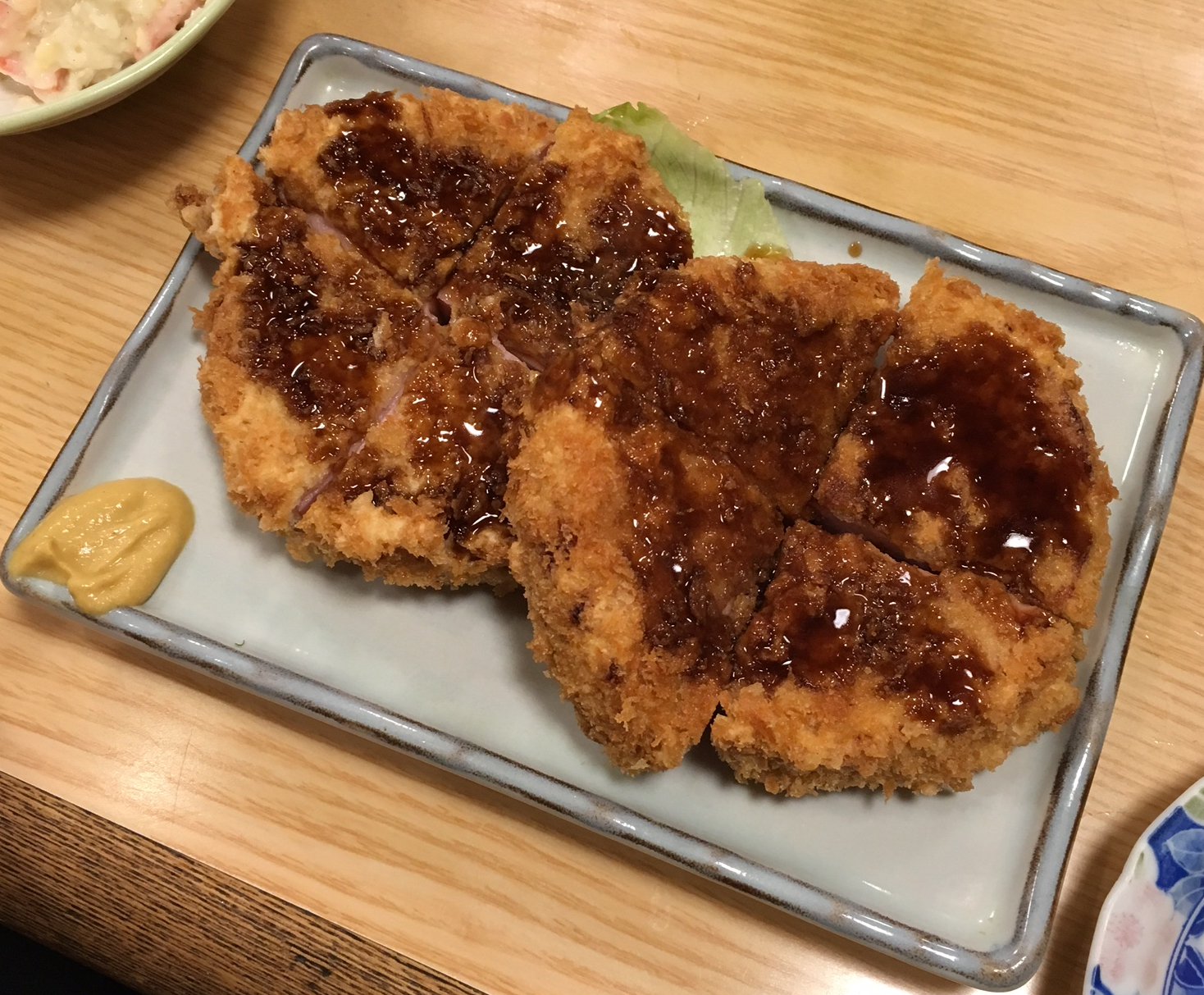 居酒屋の定番、ハムカツ。